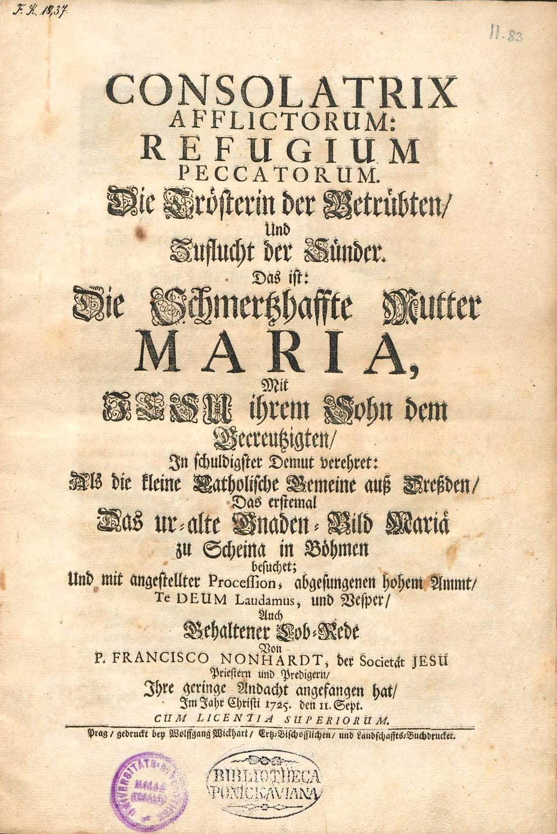 CONSOLATRIX AFFLICTORUM: REFUGIUM PECCATORUM. Die Trösterin der Betrübten / Und Zuflucht der Sünder. Das ist: Die Schmertzhaffte Mutter MARIA, mit JESU ihrem Sohn dem Gecreutzigten / In schuldigster Demut verehret: Als die kleine Catholische Gemeine auß Dreßden / Das erstemal Das ur=alte Gnaden=Bild Mariä zu Scheina in Böhmen besuchet; Und mit angestellter Procession, abgesungenen hohem Ammt / Te DEUM Laudamus, und Vesper / Auch Gehaltener Lob=Rede Von P. FRANCISCO NONHARDT, der Societät JESU Priestern und Predigern / Ihre geringe Andacht angefangen hat / Im Jahre Christi 1725. den 11. Sept. CUM LICENTIA SUPERIORUM. Prag / gedruckt bey Wolffgang Wickhart / Ertz=Bischofflichen / und Landschaffts=Buchdrucker